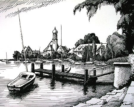 Wasserburg am Bodenseetitle QS:P1476,de:"Wasserburg am Bodensee" label QS:Lde,"Wasserburg am Bodensee"